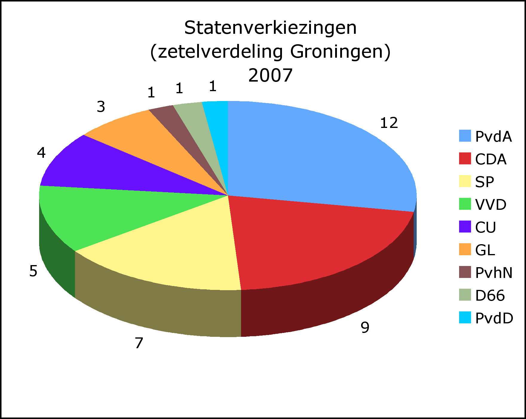 Uitslag provinciale statenverkiezingen Groningen vertaald in zetels